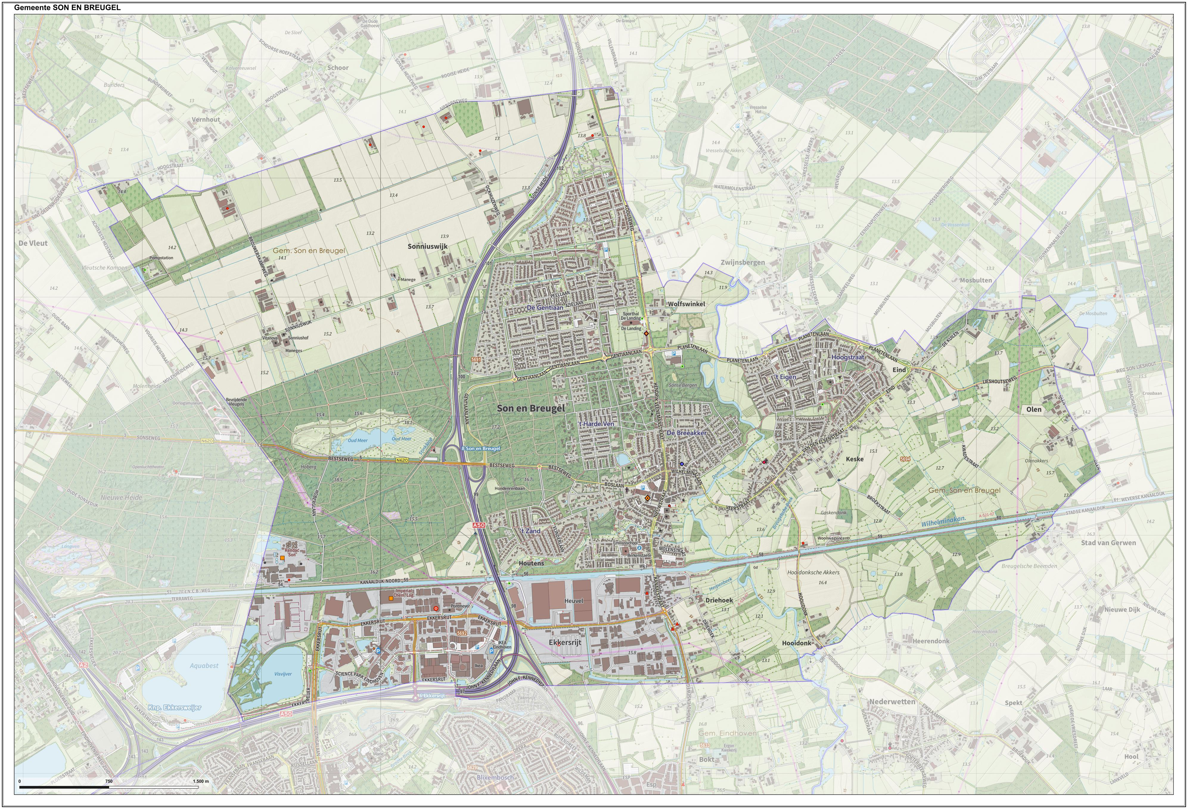 Topografische gemeentekaart. Resolutie: 400 pixels/km. Kaartbeeld samengesteld uit de open geodata van de Top10NL en Top25namen (Basisregistratie Topografie), Creative Commons BY licentie. Gebouwvlakken uit open geodata BAG extract. Wegen uit de OpenStreetMap, OpenStreetMap community. Schaduwreliëf uit de Actuele Hoogtekaart AHN2. Samenstelling en kleurenschema: Jan-Willem van Aalst, met QGIS2. Zie ook de Legenda.